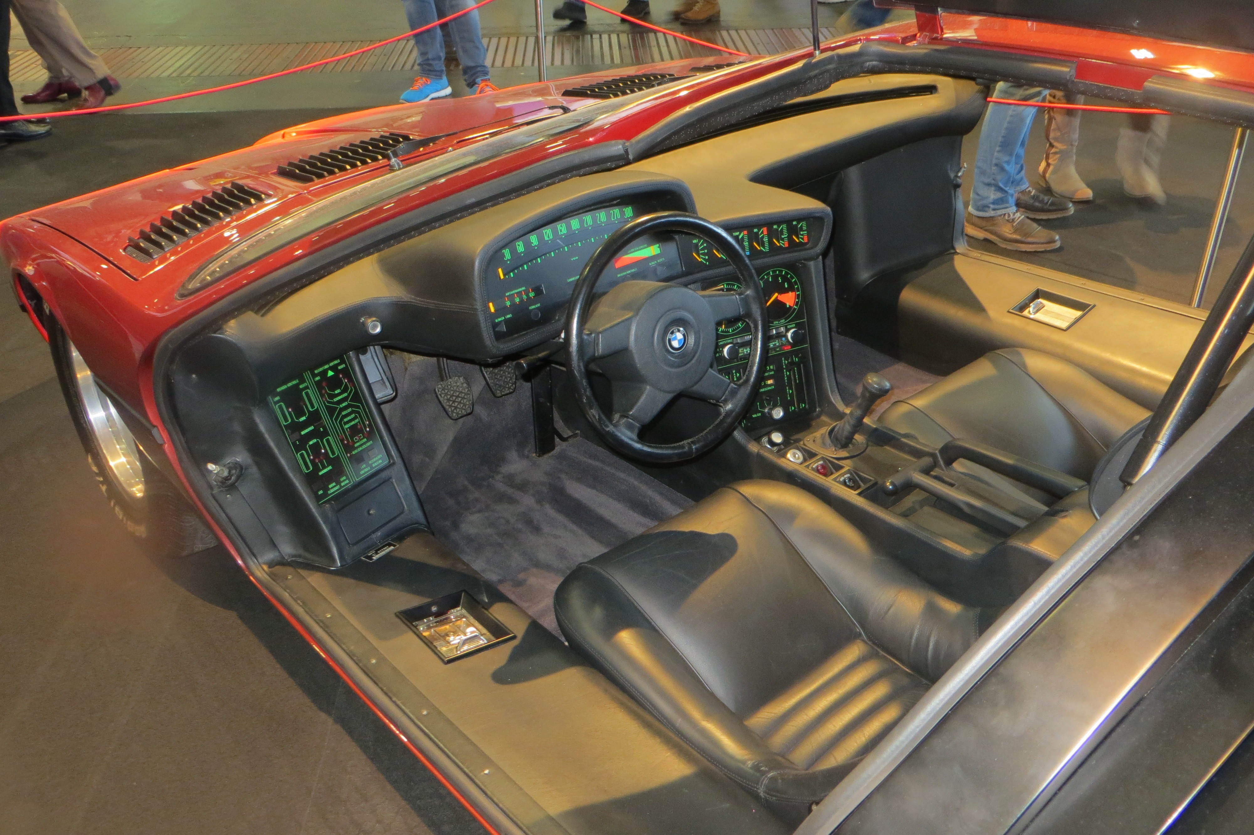 Cockpit des BMW X1 , fotografiert auf der Bremen Motor Classics 2016